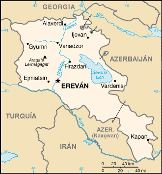 Armenia